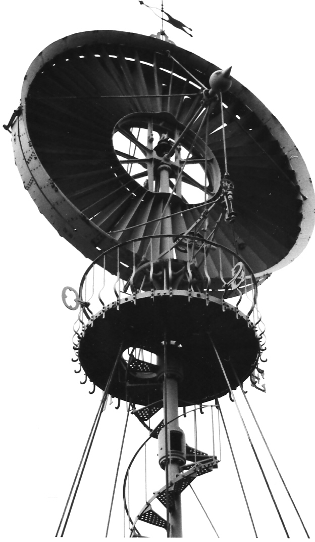 Rotor de l'Éolienne Bollée de Roueïre (1898) - Quarante (Hérault).